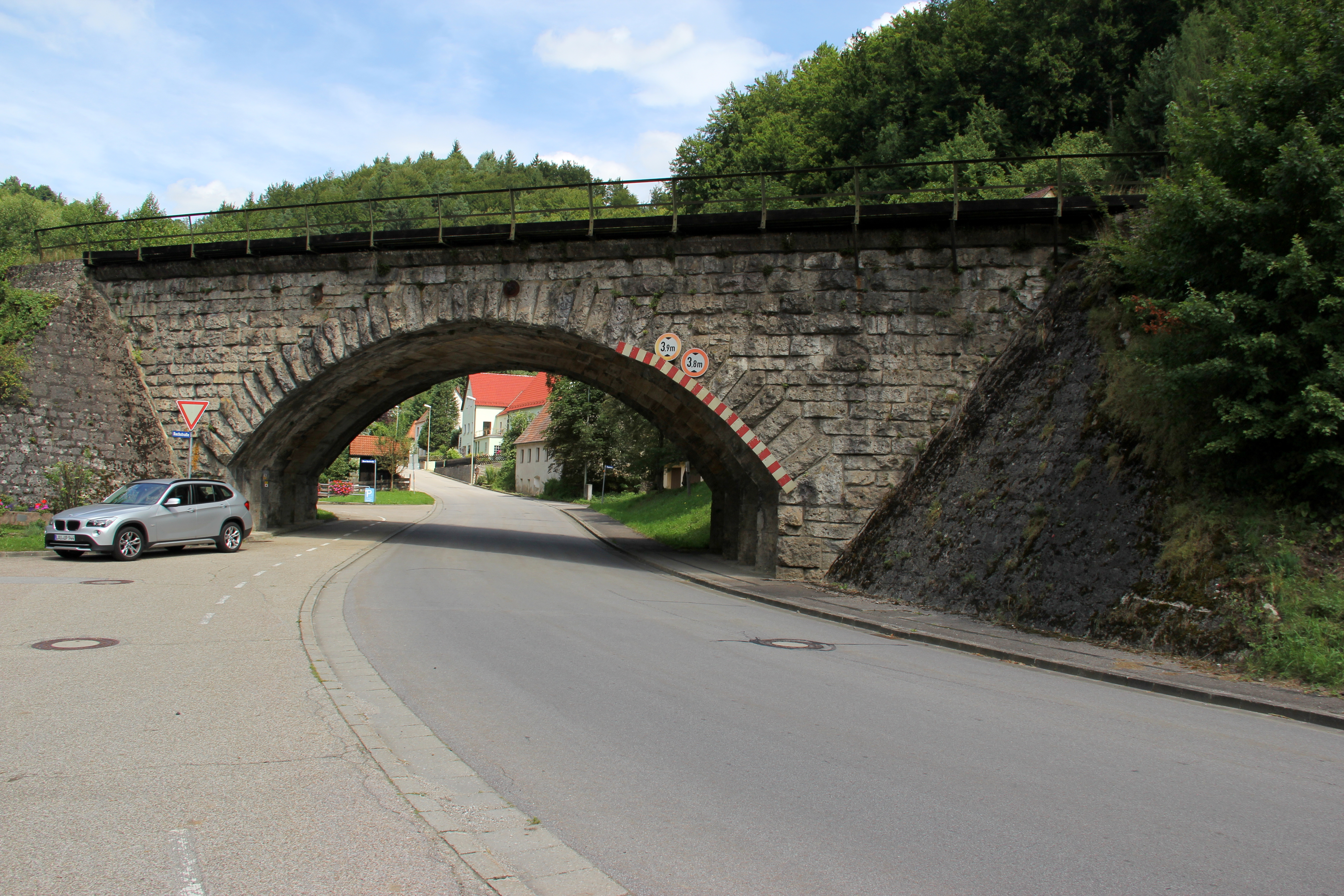 Eisenbahnbrücke